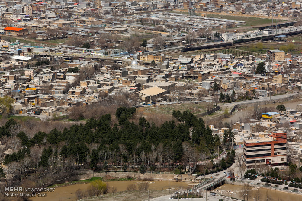 دورود یکی از شهرهای استان لرستان است. دورود در دامنه رشته کوه زاگرس و در نزدیکی اشترانکوه قرار گرفته است. دو سر شاخه رود دز یکی از شمال و یکی از شرق در دورود به هم می‌پیوندند.